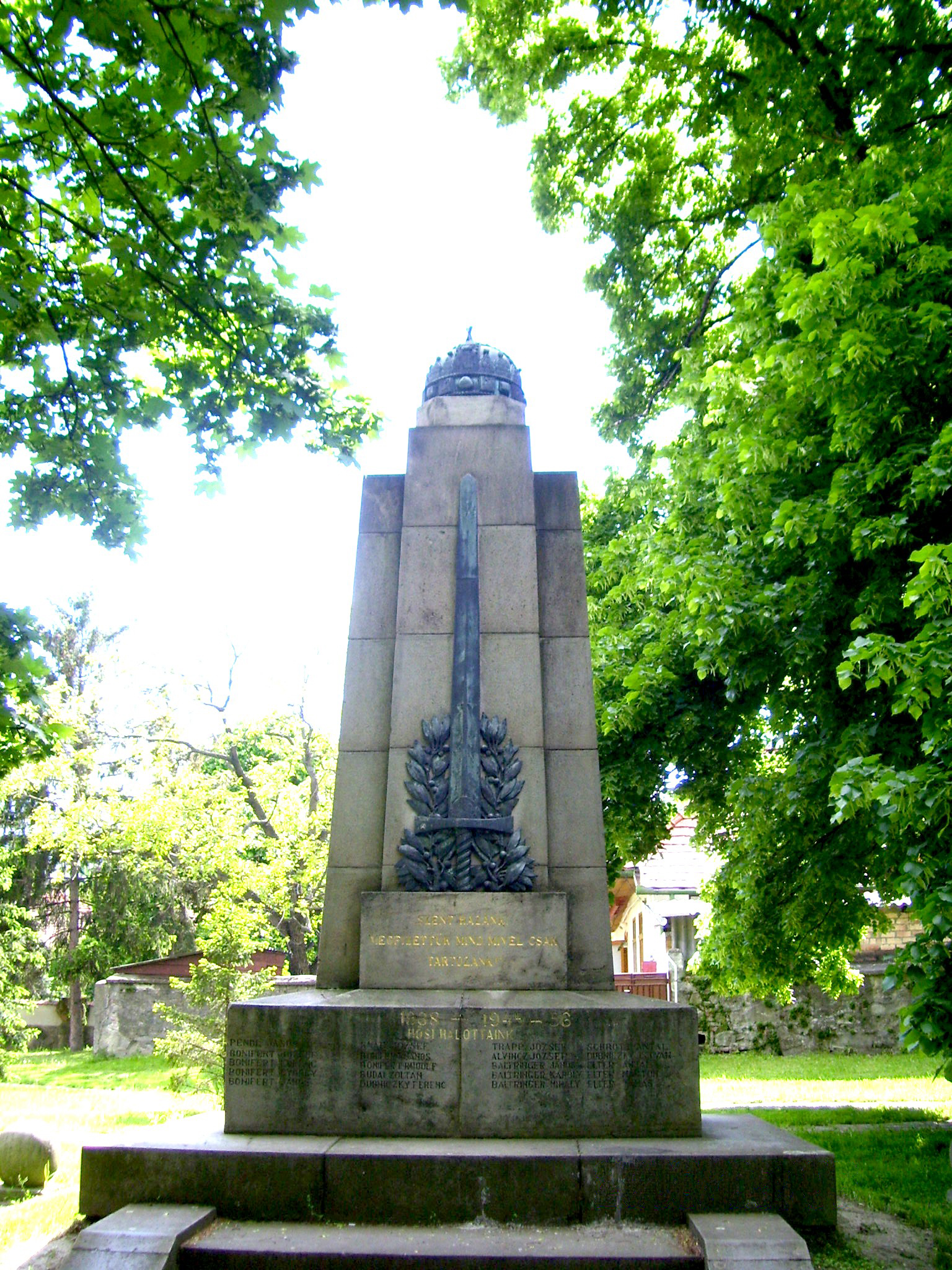 Dunabogdányi emlékmű (1938-1944-1956)